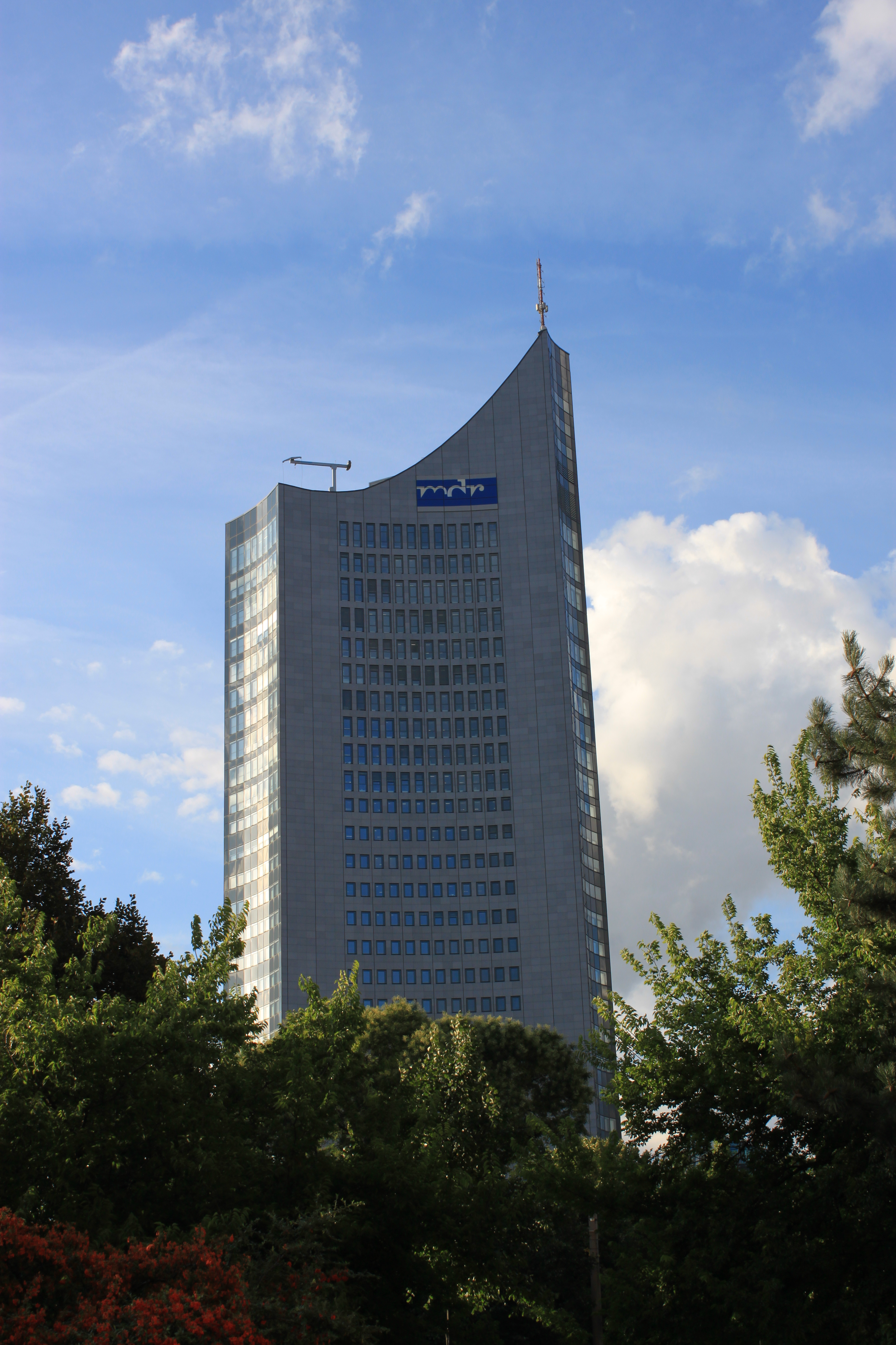 Das City-Hochhaus in Leipzig